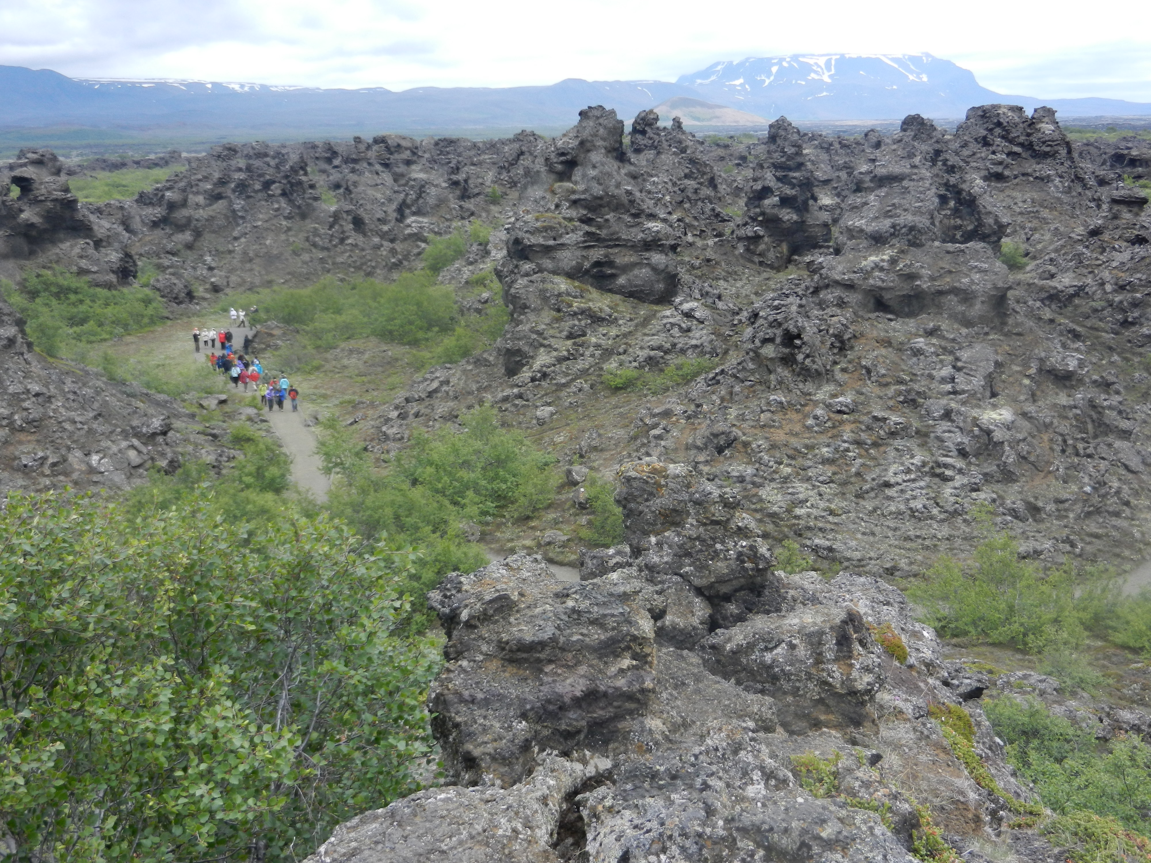 Lavine formacije v Dimmuborgirju, Mývatn, Islandija.